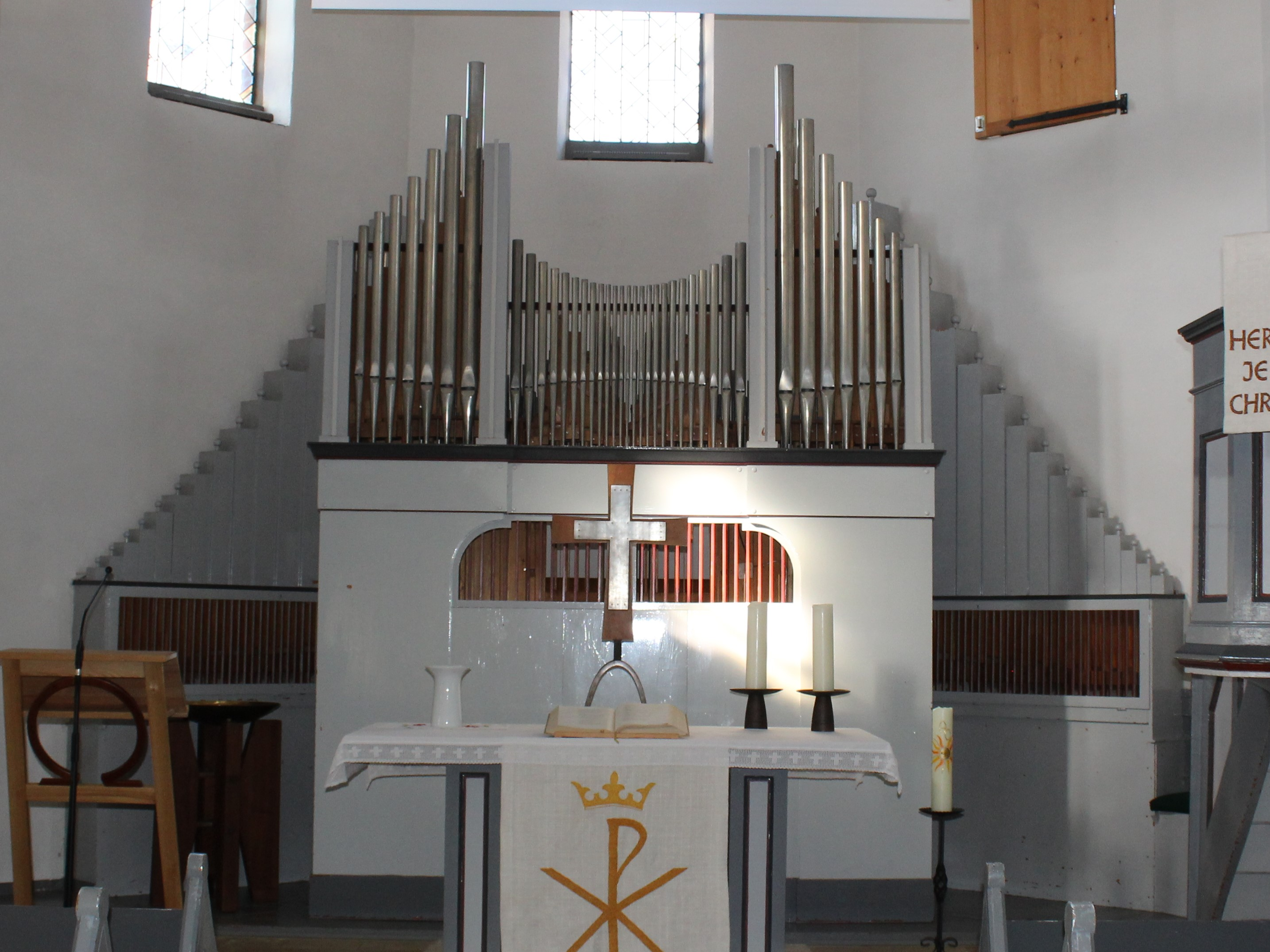 Ev. Kirche Wissenbach, Gemeinde Eschenburg, Hessen, Deutschland